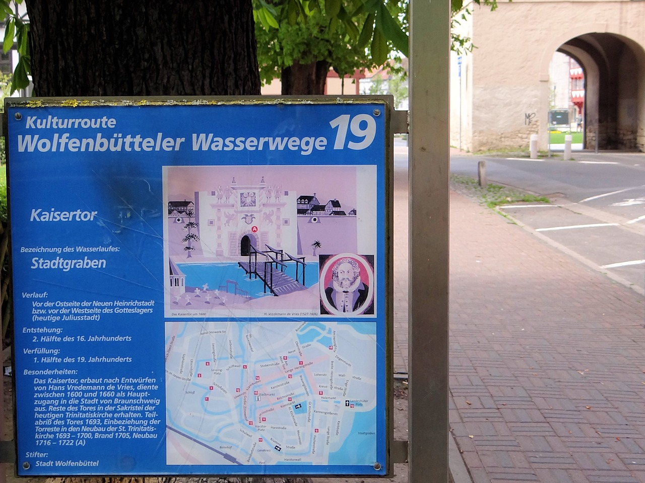 Informationstafel am Herzogtor in Wolfenbüttel zur Kulturroute Wolfebütteler Wasserwege mit Tor der Trinitatis-Kirche im Hintergrund